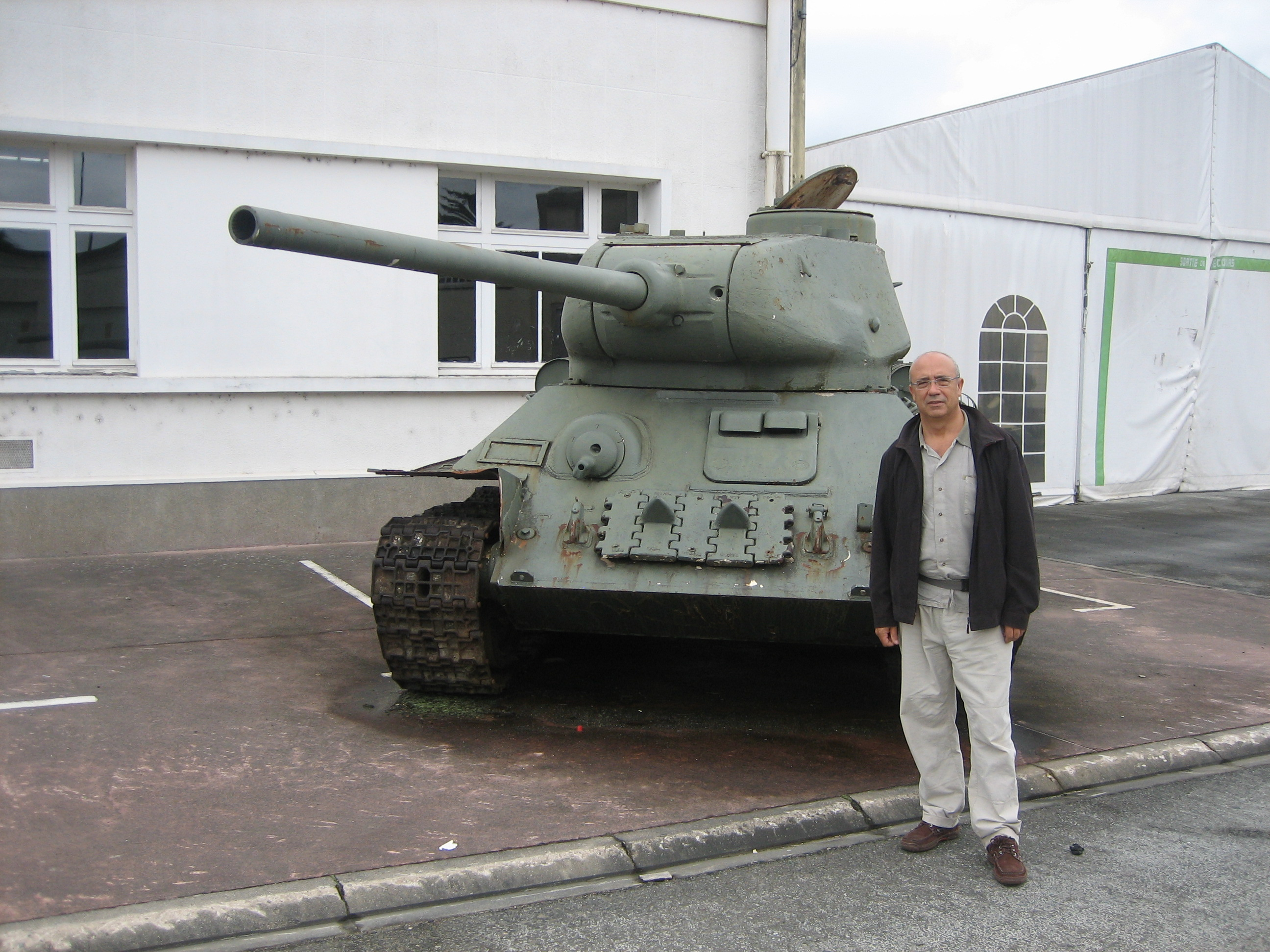 Francesc Xavier Hernàndez (Treball de camp a Normandia)